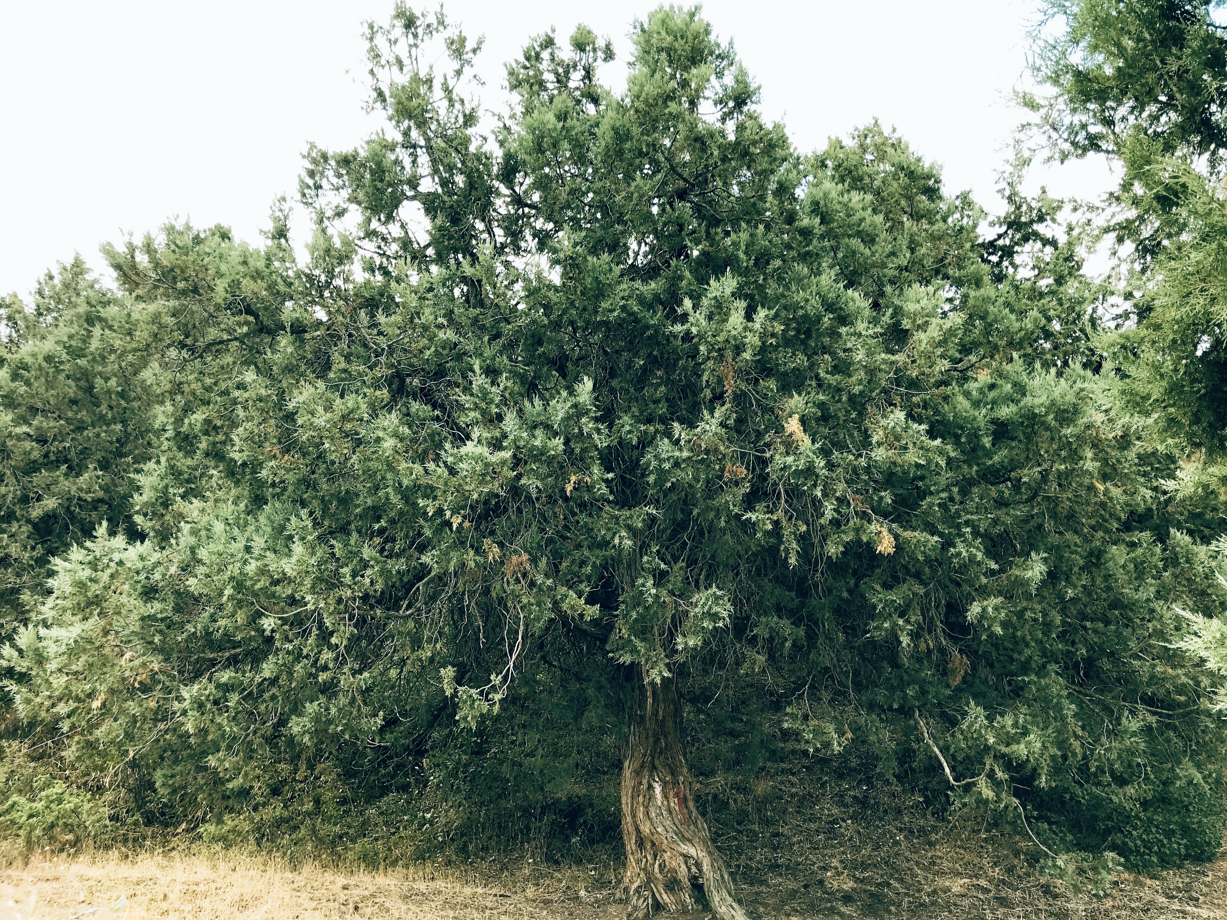 Գիհի, Խոսրովի անտառ պետական արգելոց